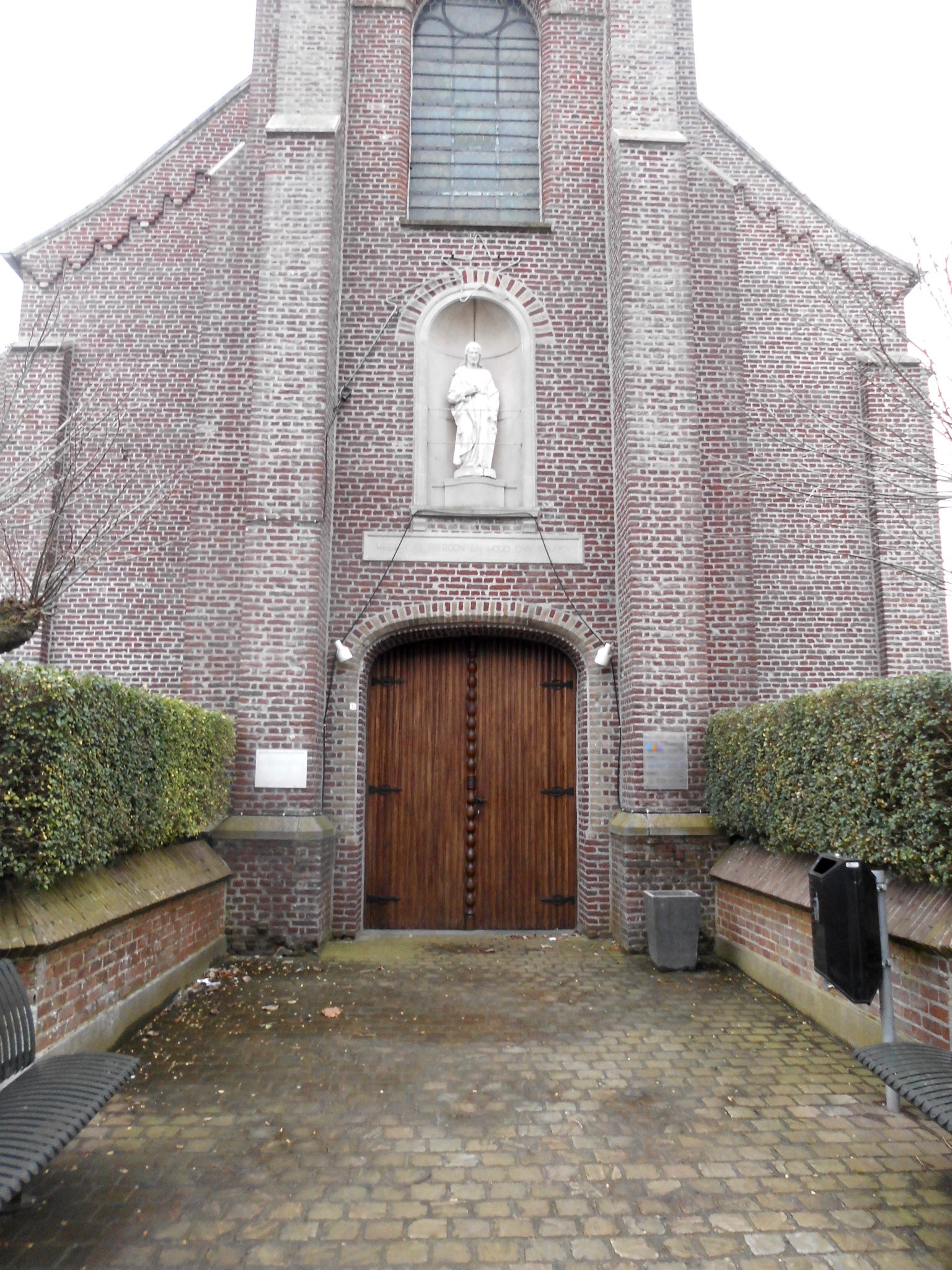 Ingang van de Sint-Jozefskerk - Amersveldestraat - Sint-Jozef-de-Geite - Hooglede - West-Vlaanderen - België